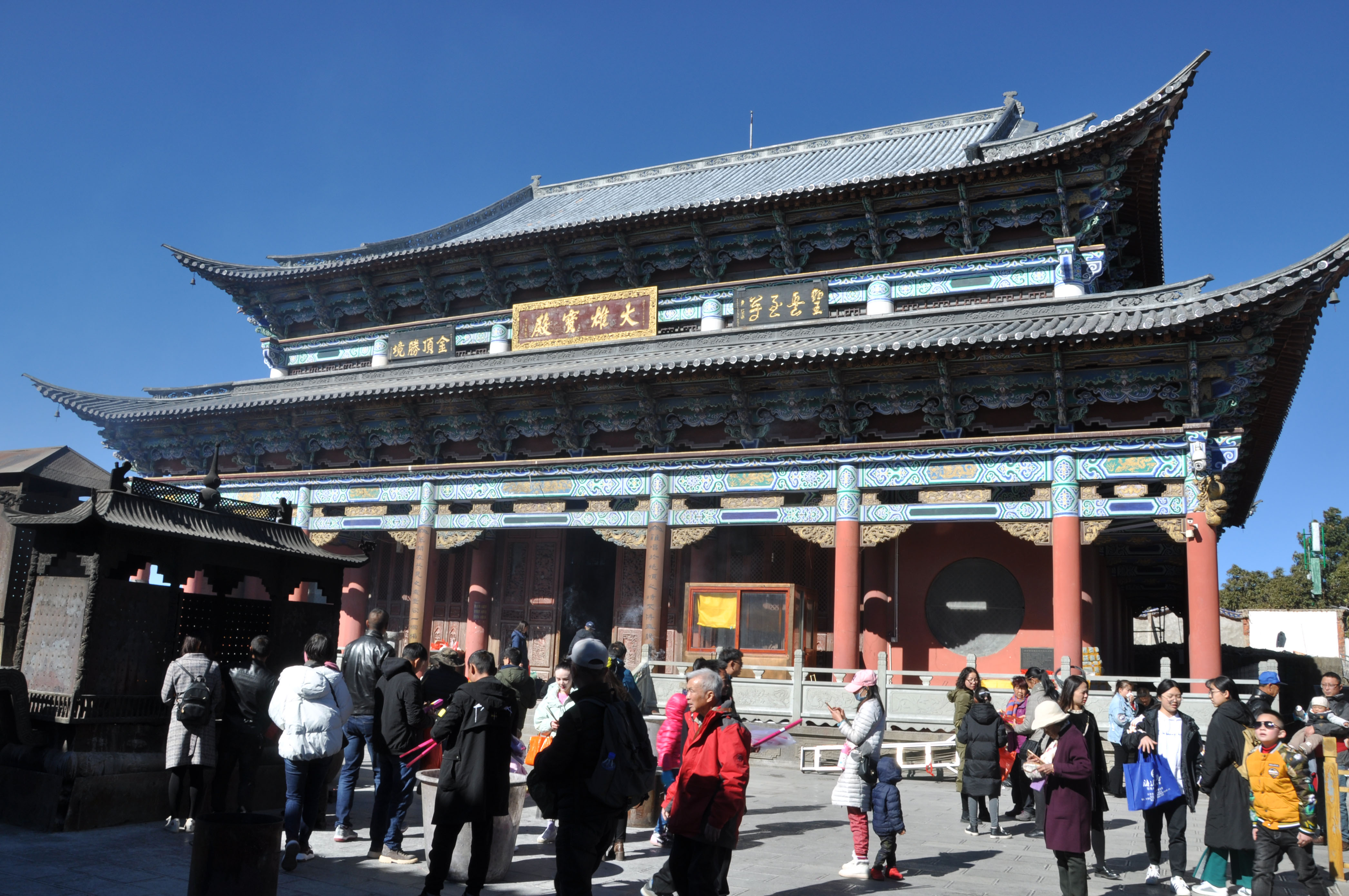 鸡足山金顶寺大雄宝殿